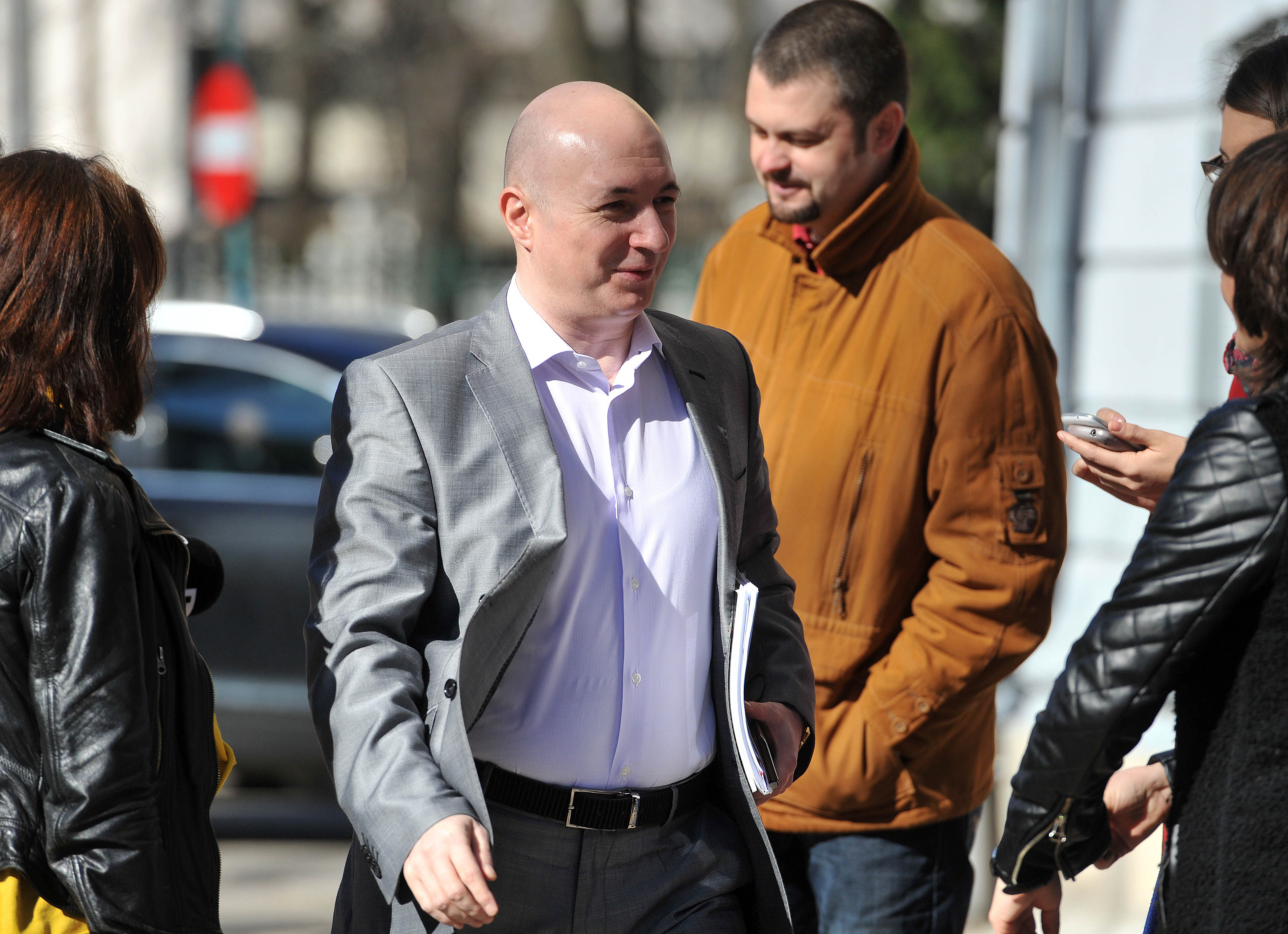 Codrin Stefanescu la reuniunea BPN al PSD - 17.03.2014